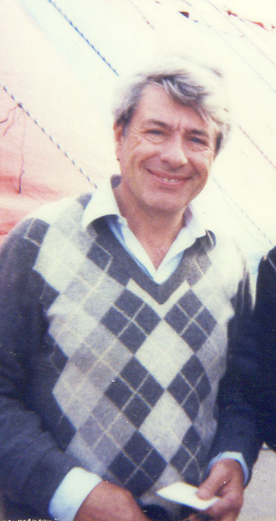 Le journaliste et présentateur Roger Gicquel en 1983, lors d'un spectacle à La Baule.